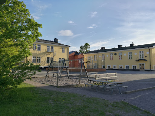 Gillboskolan